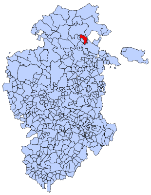 Situación de Merindad de Cuesta-Urria en el mapa de Burgos.